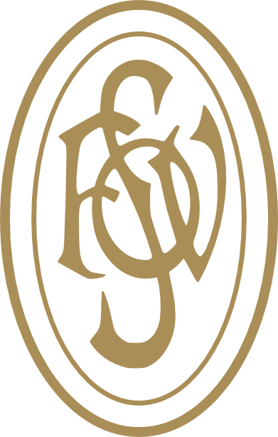 Altes Logo des Südostdeutschen Fußball-Verbandes (SOFV). Other vesions